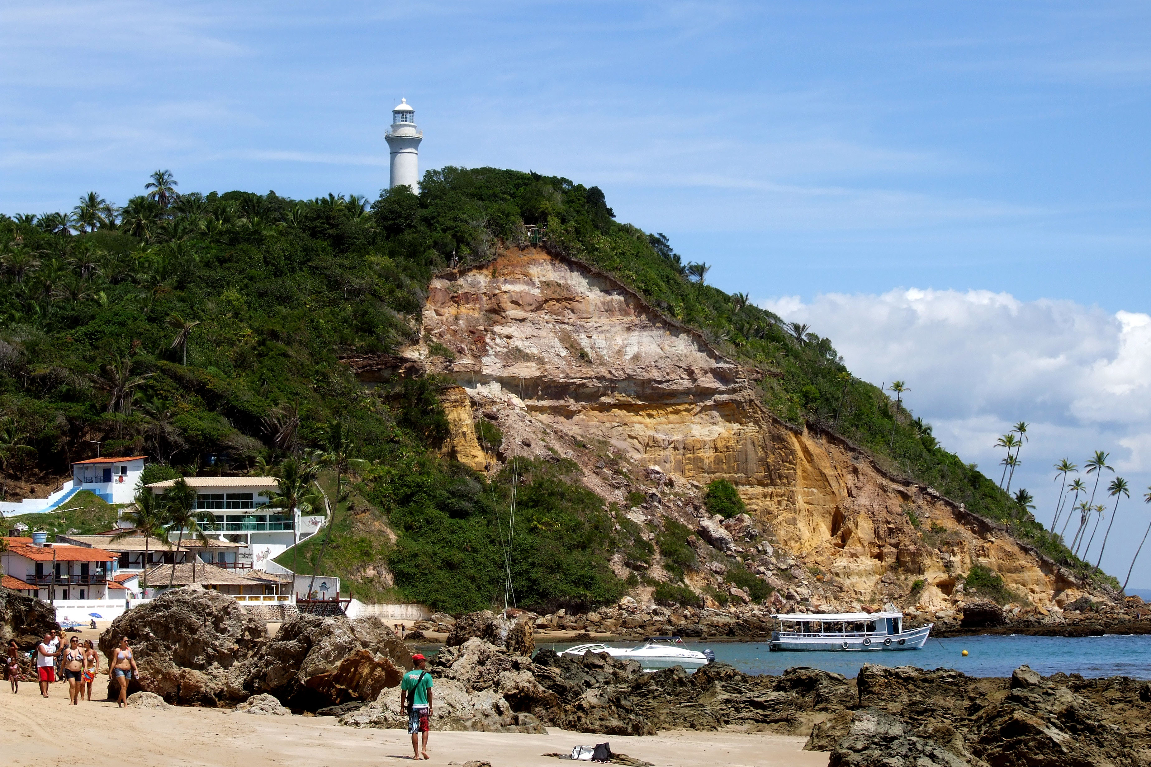 Morro de São Paulo Lighthouse